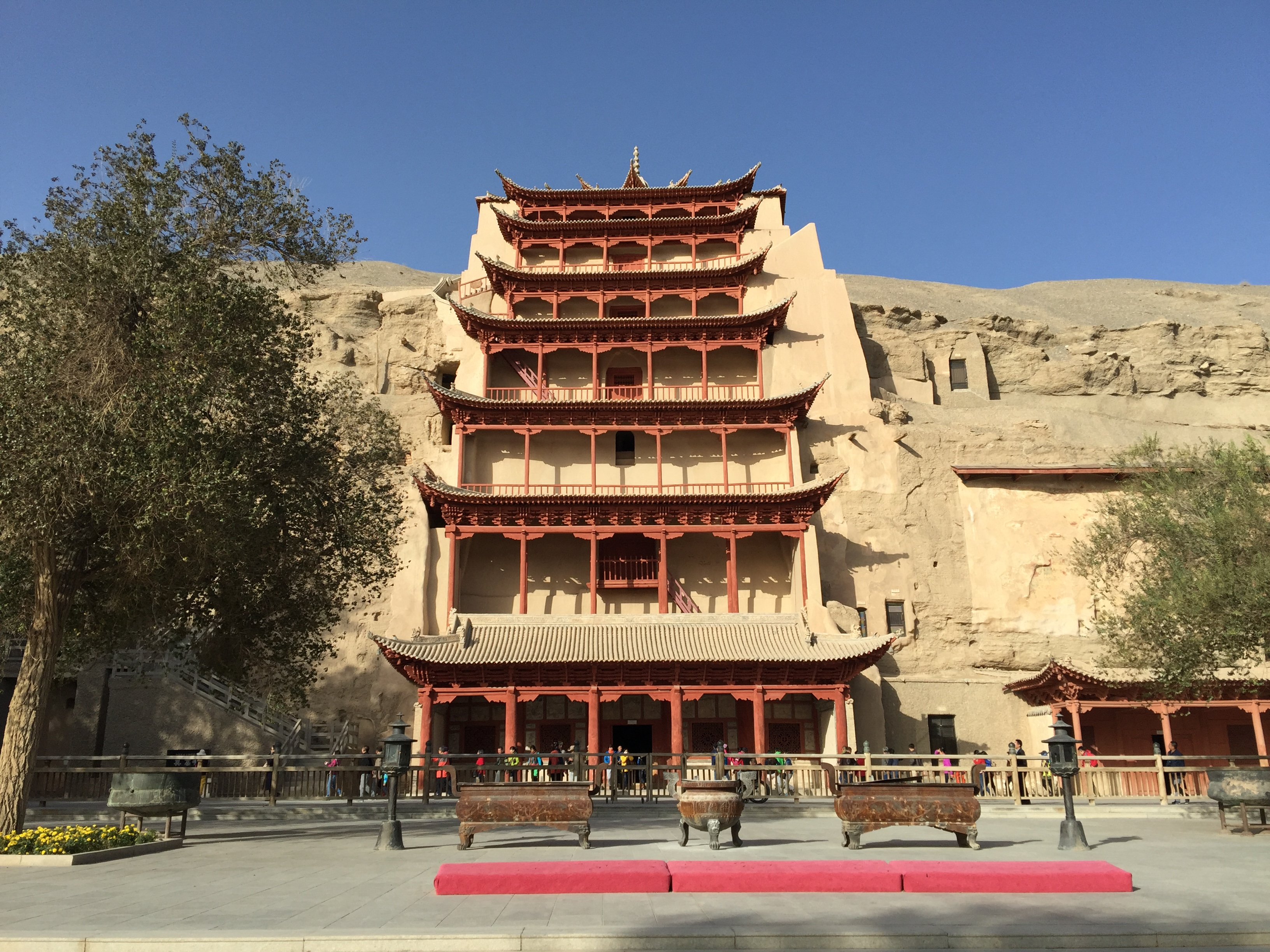 莫高窟中段第96窟的窟檐建筑（九层楼）